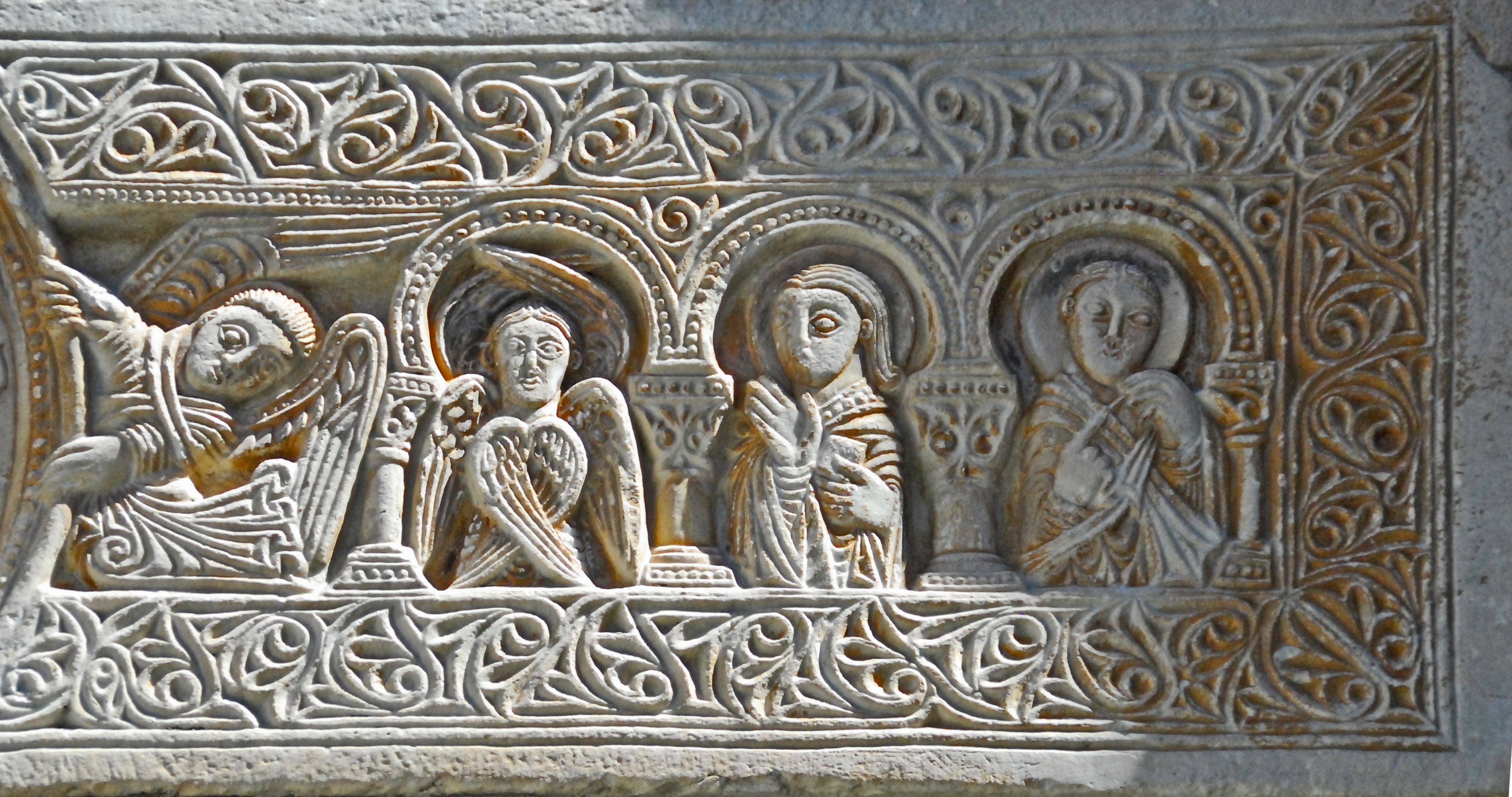 St-André-de-Sorède, Tßürsturz, rechte Seite